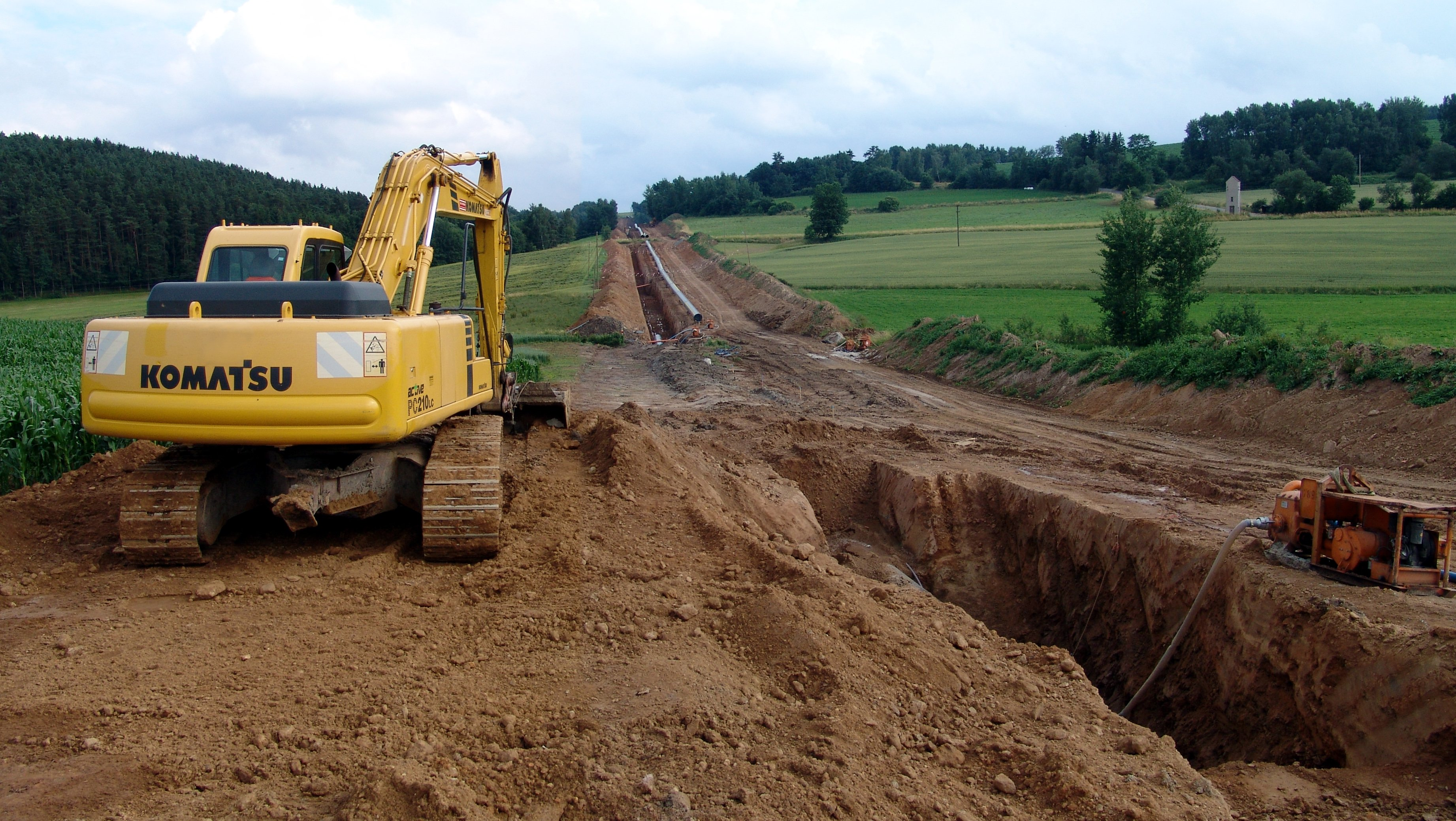 Pipeline im Bau